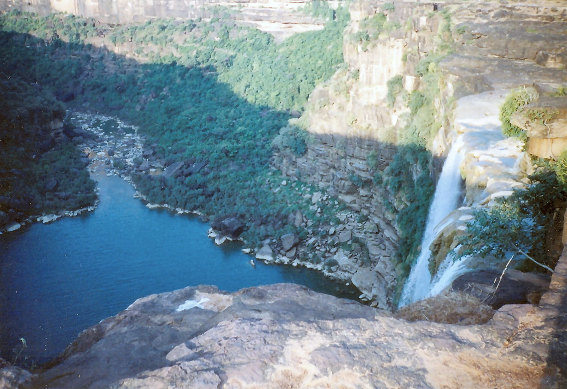 Keoti Fall in Rewa district, Madhya Pradesh, India